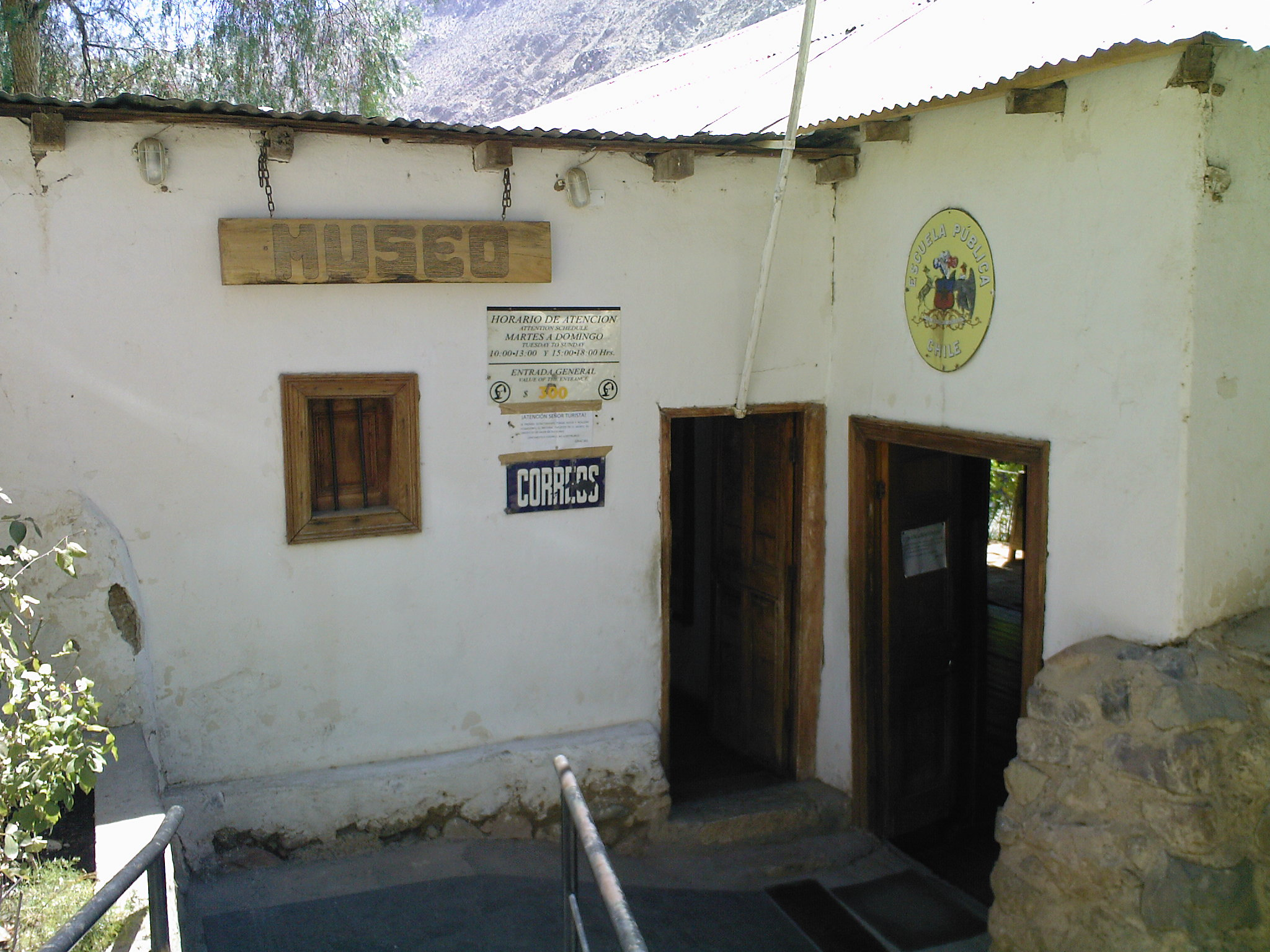 Lugar donde vivió y estudió Gabriela Mistral This is a photo of a national monument in Chile: 598